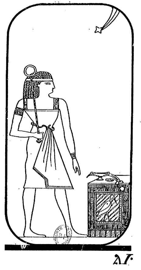 L'initié / Arcane majeur / Illustrateur : Wegener, Otto (M.ce) / Livre : Les XXII lames hermétiques du tarot divinatoire, : exactement reconstituées d'après les textes sacrés et selon la tradition des mages de l'ancienne Égypte... / Auteur : Falconnier, Robert / Éditeur : Librairie de l'art indépendant (Paris; 1896)